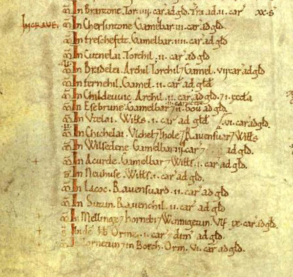 Domesday Book folio 301v_detail_Craven